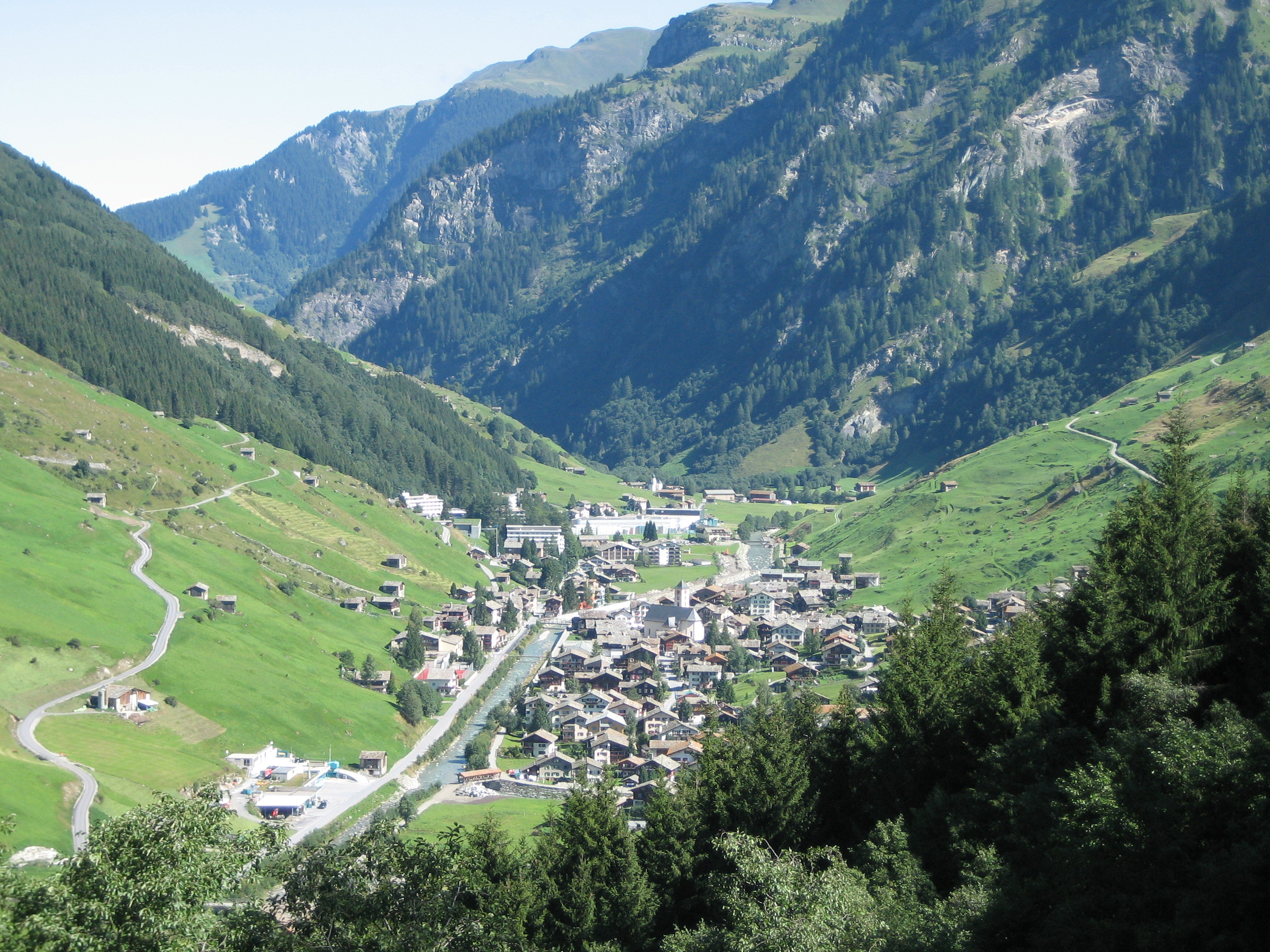 Vals, Ansicht von Süden